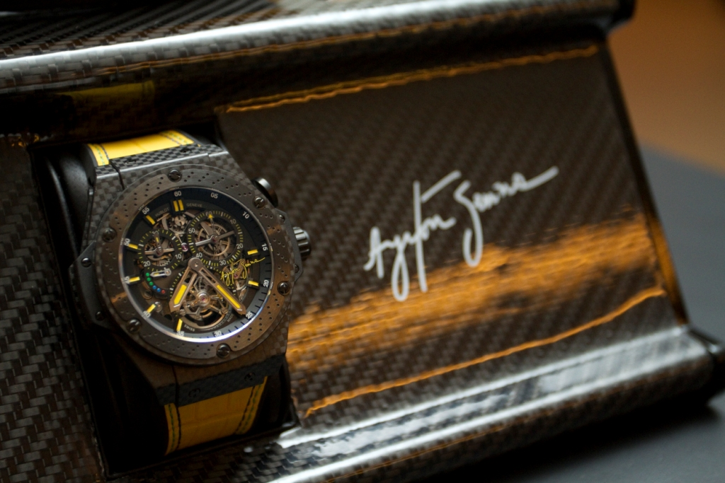 Modelo Exclusivo Hublot Ayrton Senna, lançado na premiere. (Foto: Carina Zaratin)